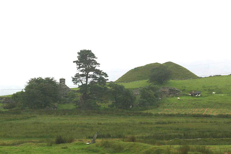 Tomen y Mur, Gwynedd